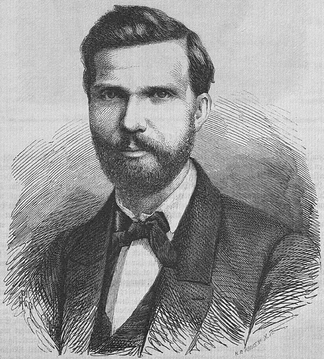 Den norske klassiske filologen Johan Thaasen (1825–1865).